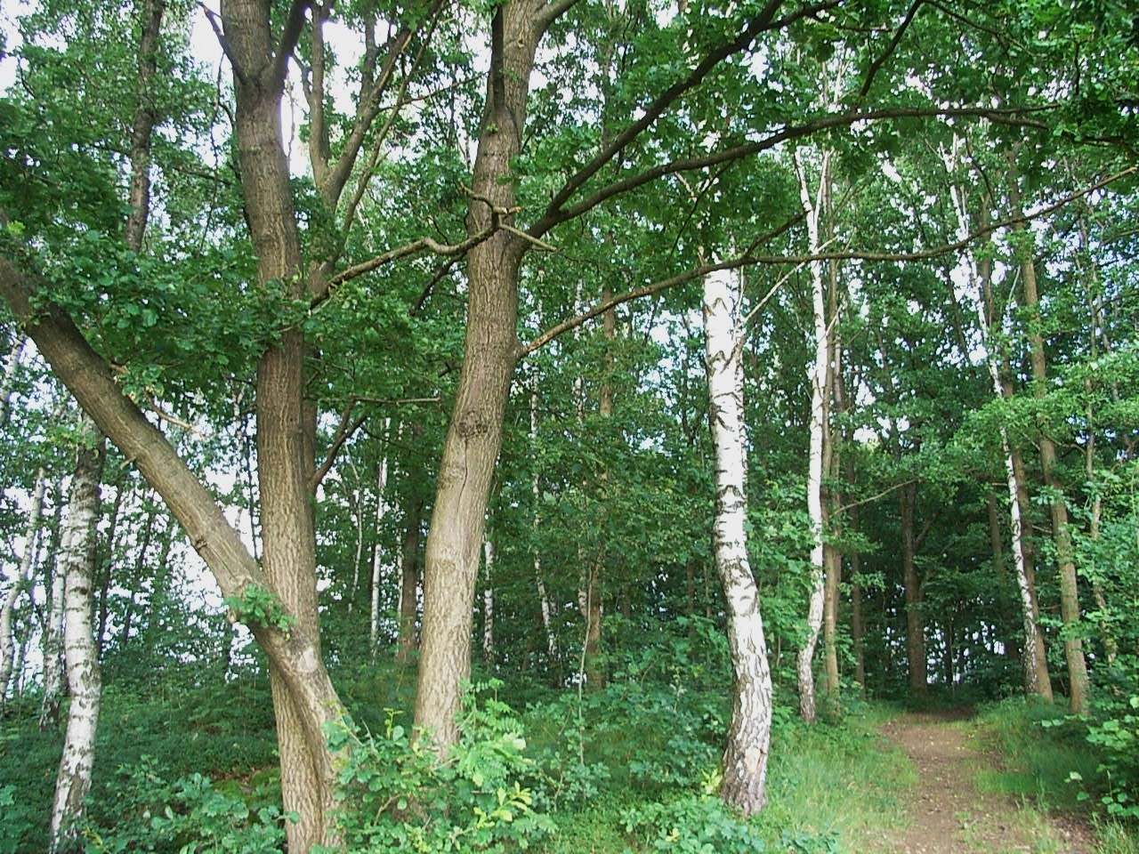 Birken-Eichenwald bei Zwiesel, Schnauckenbergl